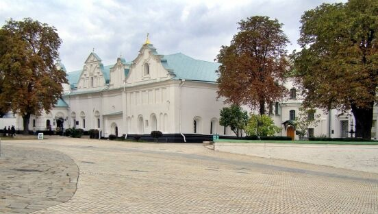 Ковнировский корпус в Киево-Печерской лавре